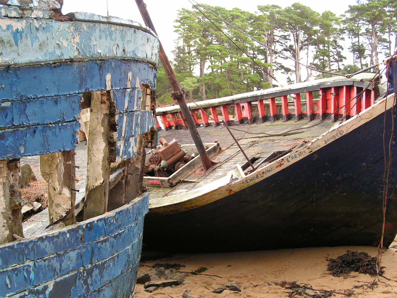 Cimetière de bateaux sur l'île de Berder Larmor-Baden, Morbihan, France